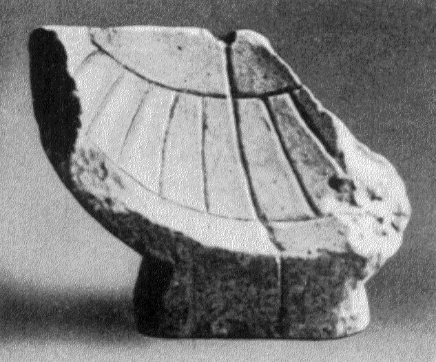 antike Sonnenuhr: Skaphe